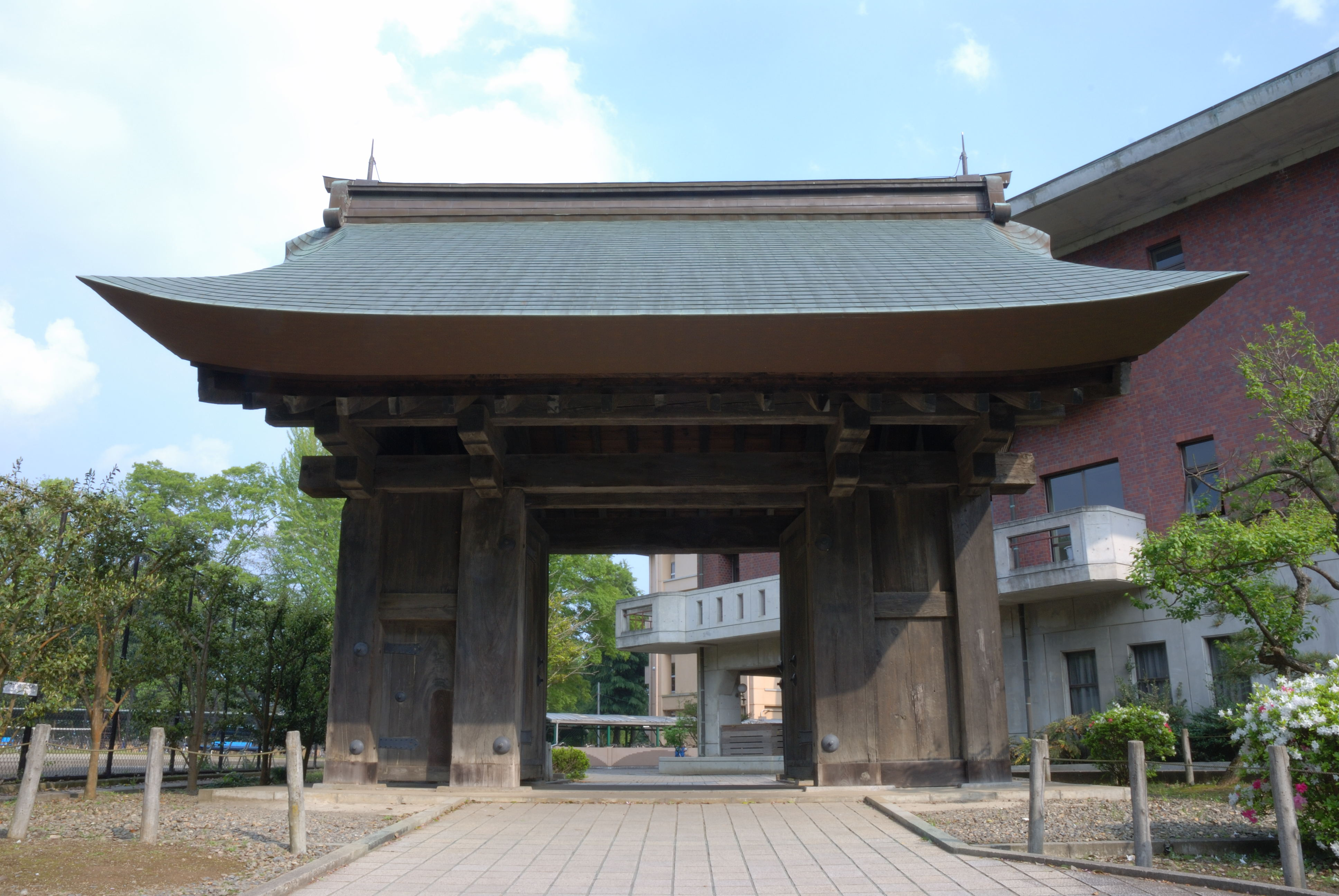 Yakuimon